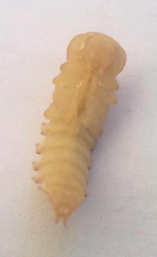 Какавида на брашнен червей